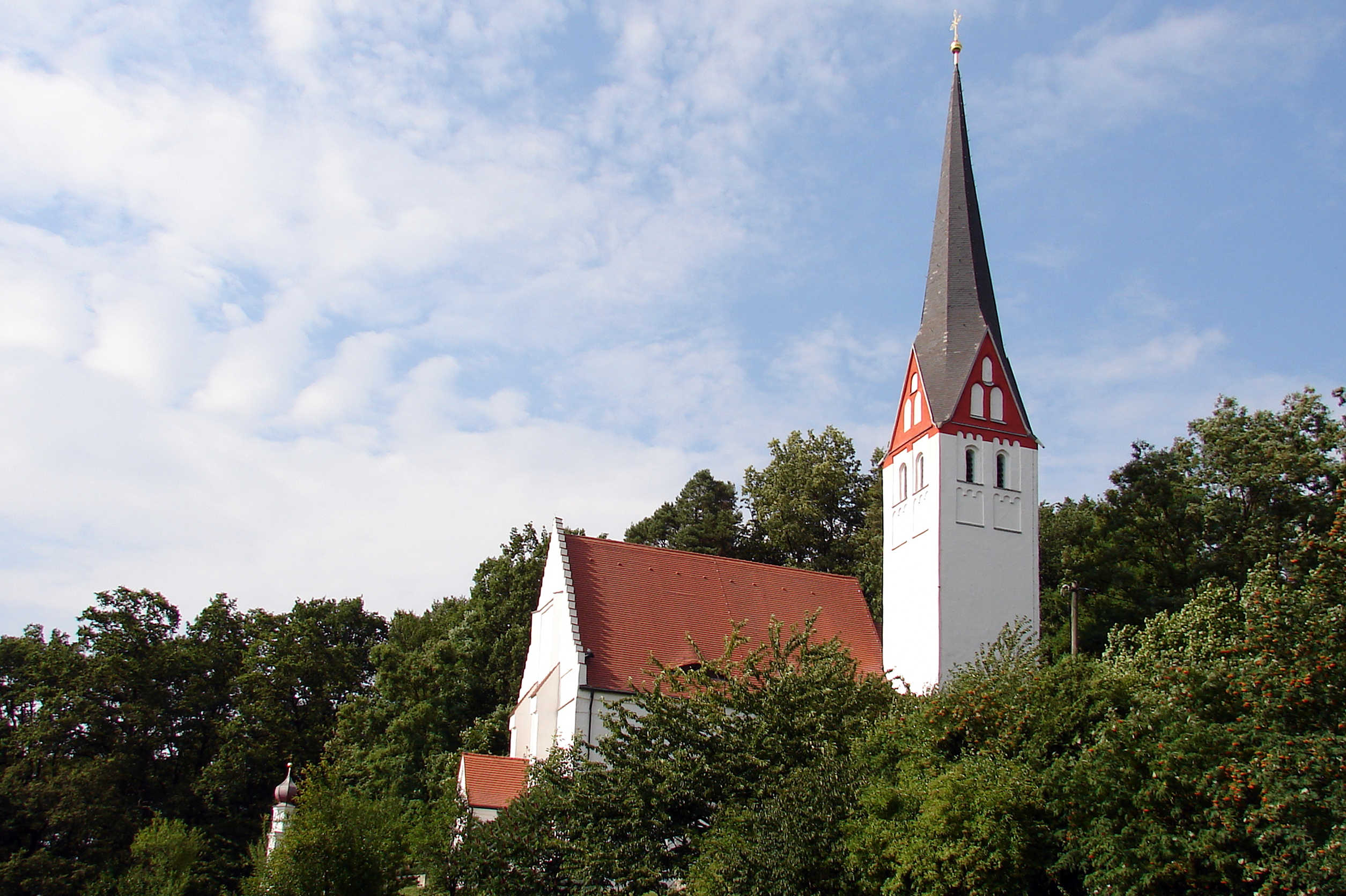 Katholische Wallfahrtskirche St. Kastulus